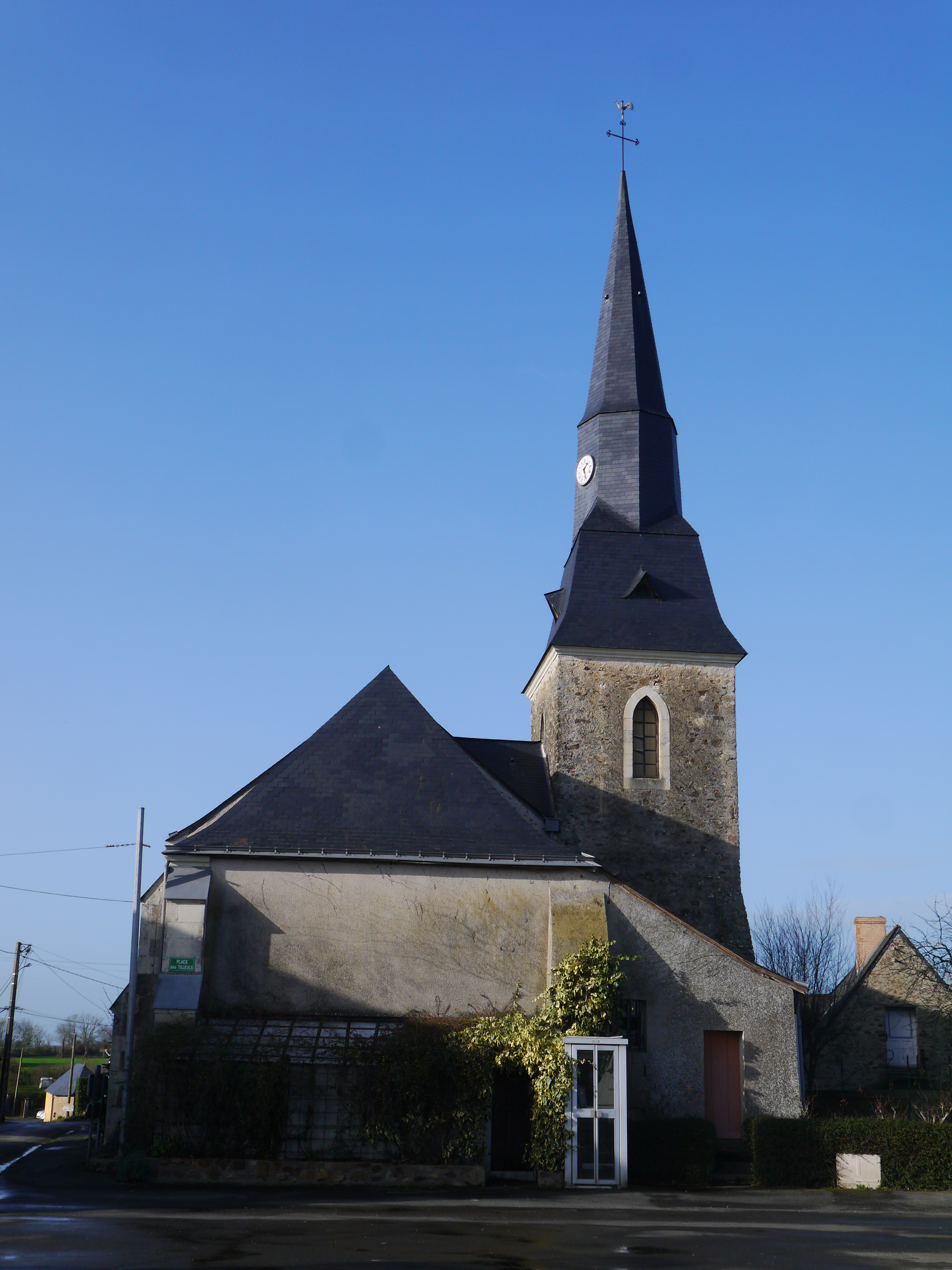 L'église Saint-Pierre.